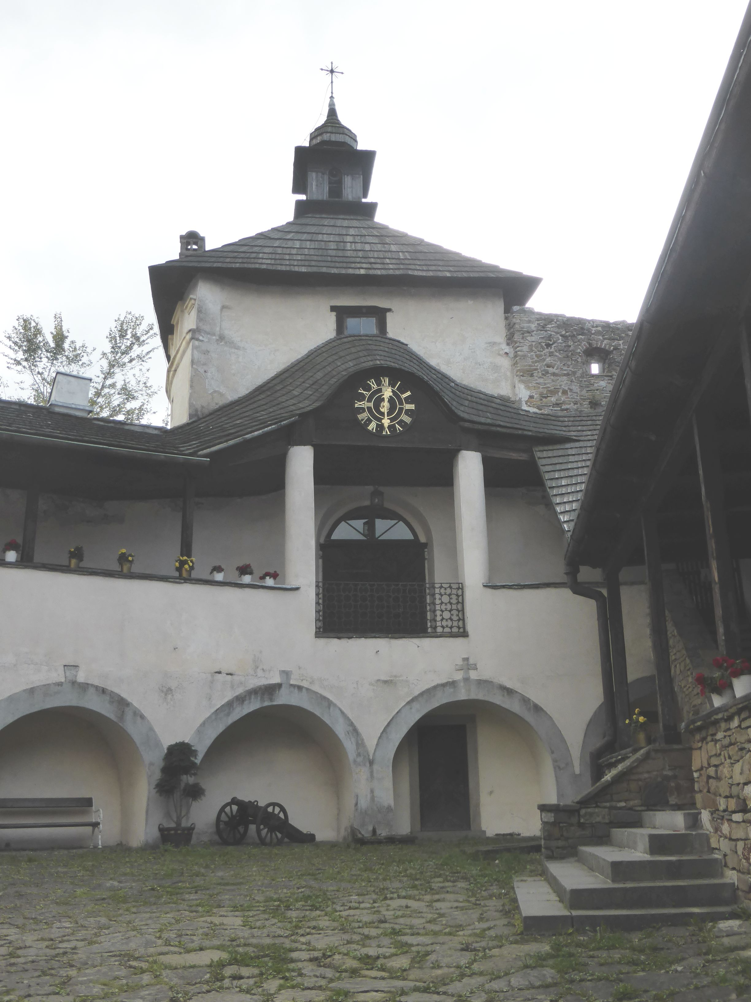 Niedzica Castle - Kapelle unteres Schloss